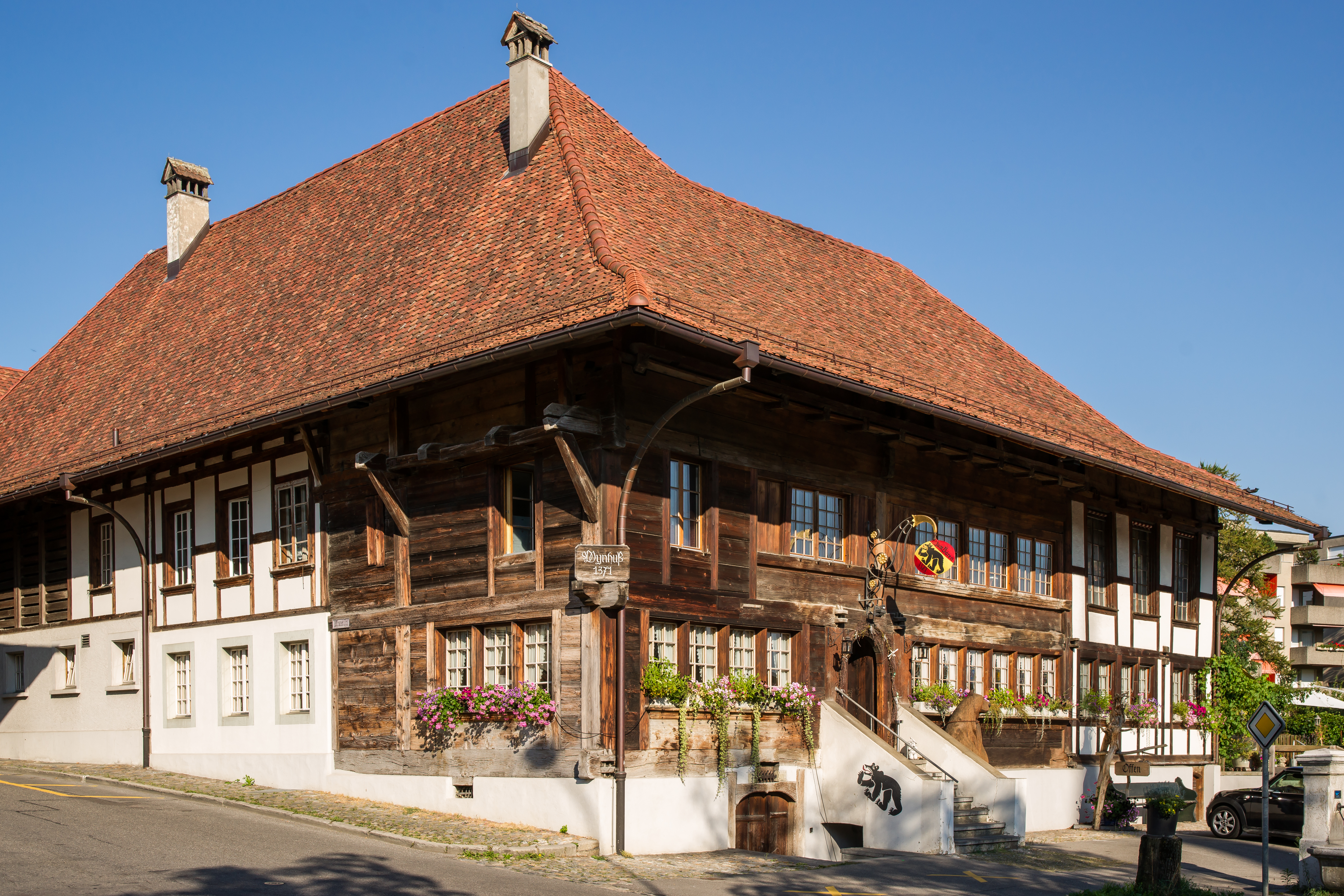 Gasthof Bären, älteste Taverne (Wynhus, Weinhaus) des Kantons Bern